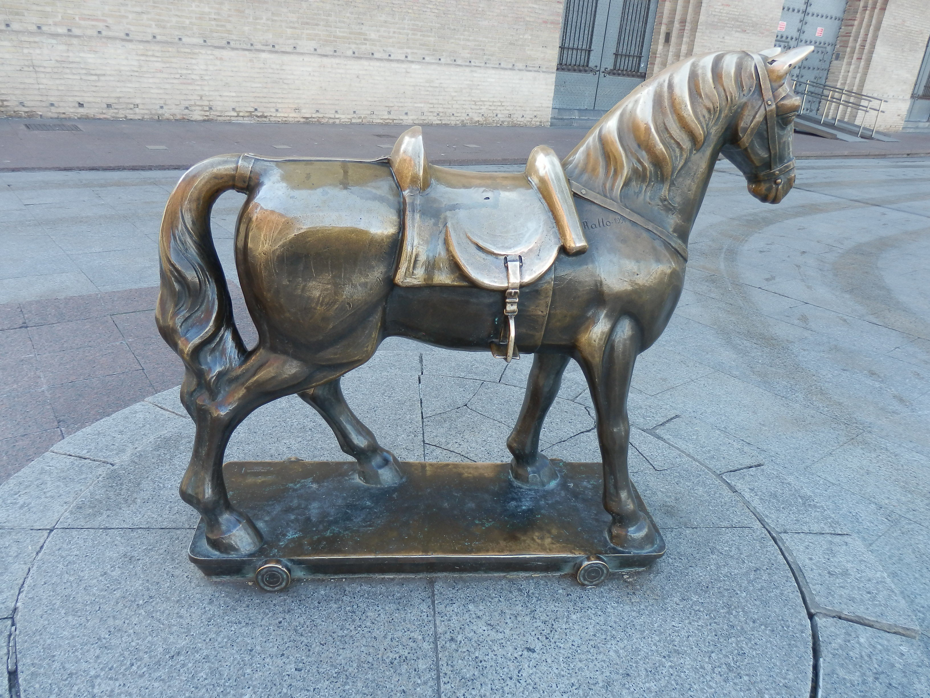 Caballo de Francisco Rallo Lahoz en Zaragoza.